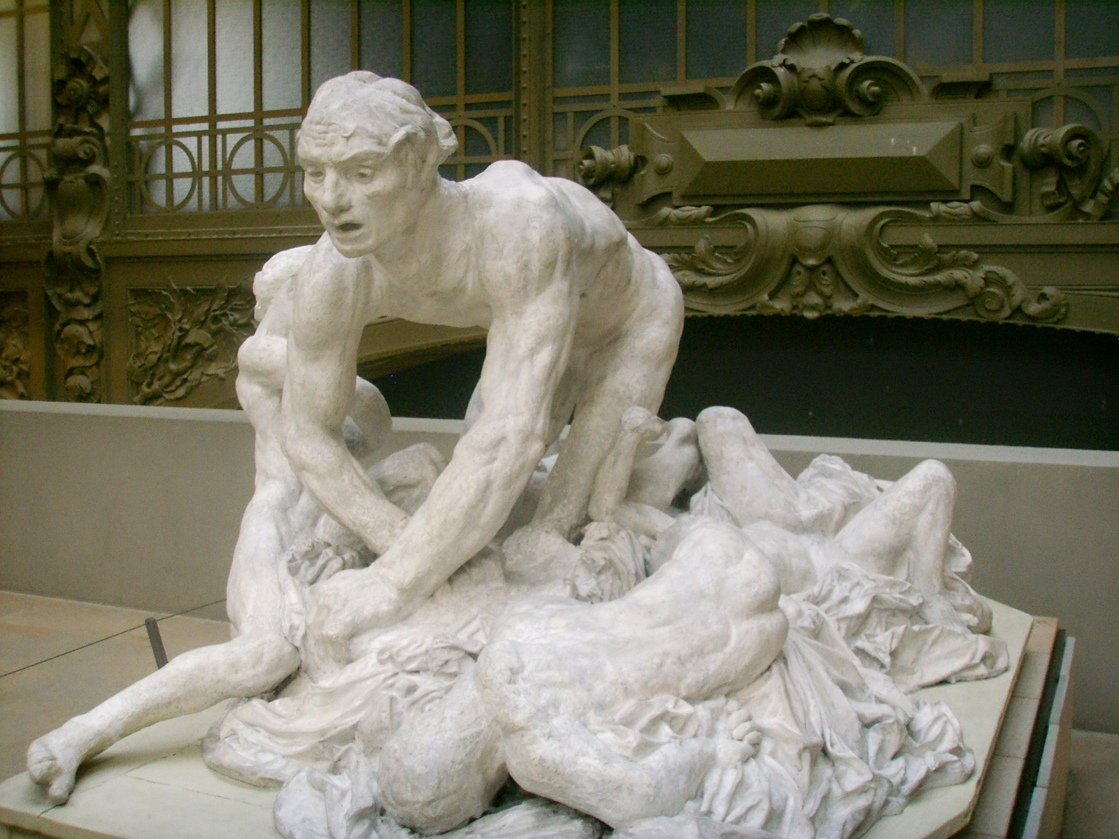 Museo_d'Orsay_auguste_rodin,_conte_ugolino